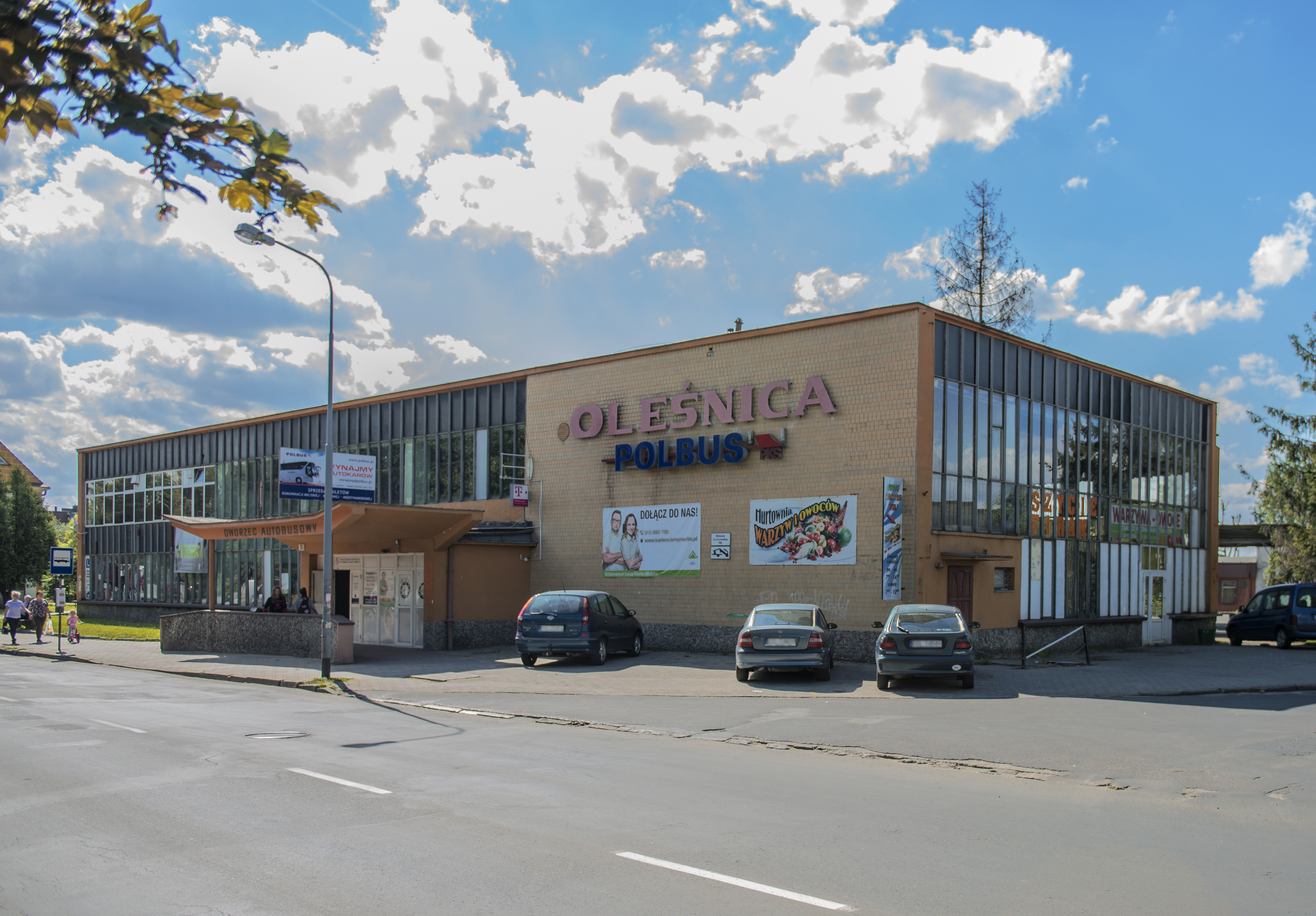 Dworzec Autobusowy